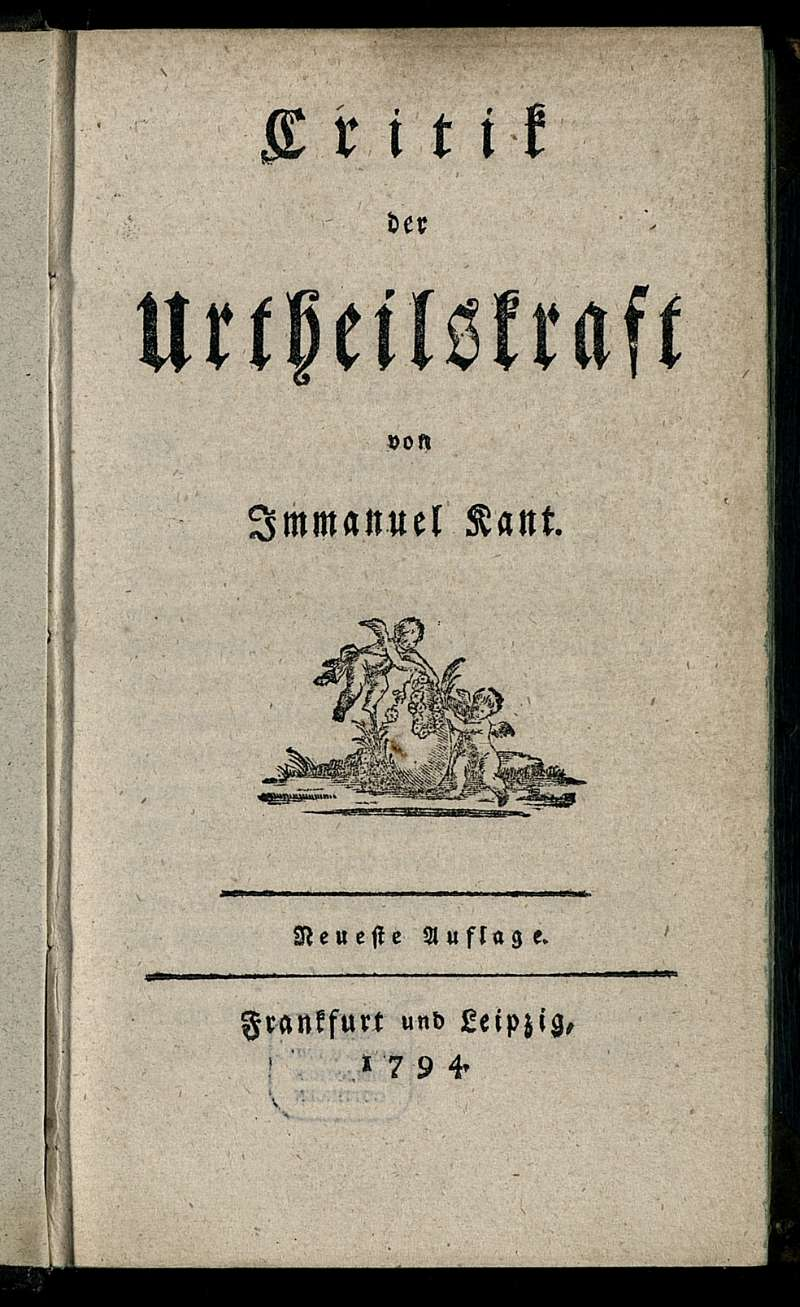 Impresión de portada o cubierta de un libro.